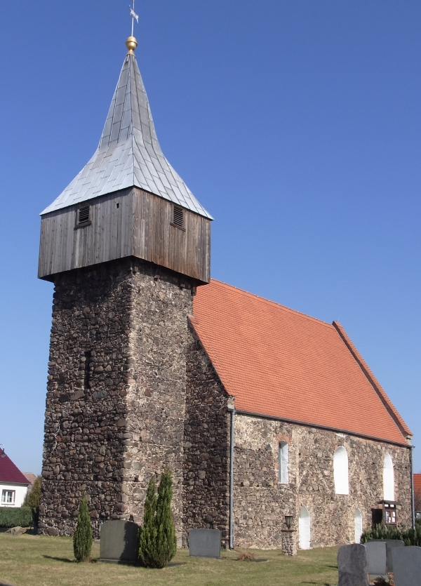 Feldsteinkirche (Wehrkirche) in Grießen, Gemeinde Jänschwalde, erbaut im 15. Jhd.